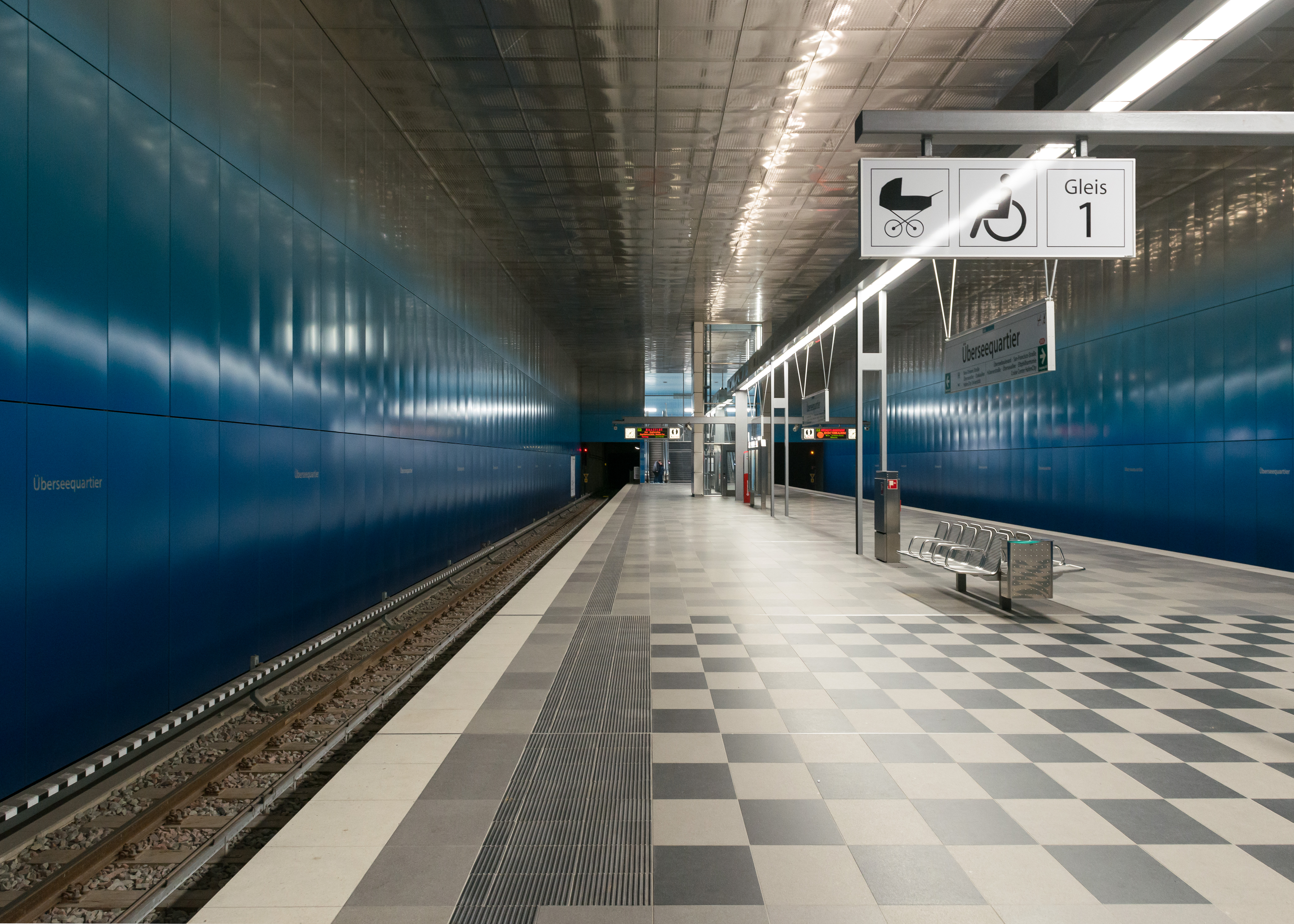 Der Bahnsteig des Hamburger U-Bahnhofes Überseequartier